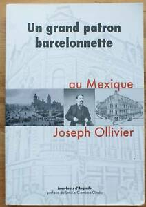 texte